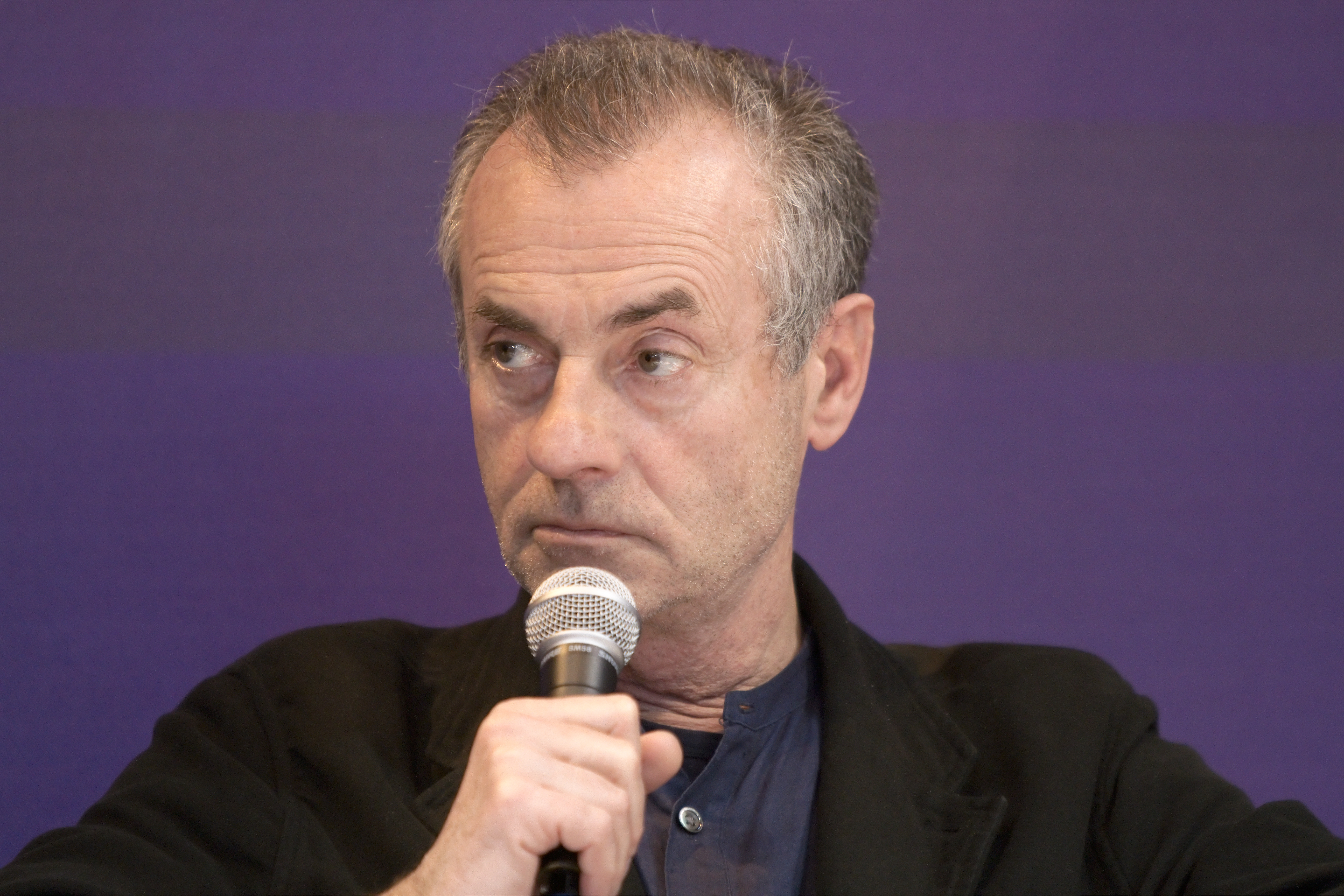 Jean Rolin au Salon du livre de Paris lors d'une table ronde sur les territoires littéraires : ville, banlieue et ultramoderne solitude.